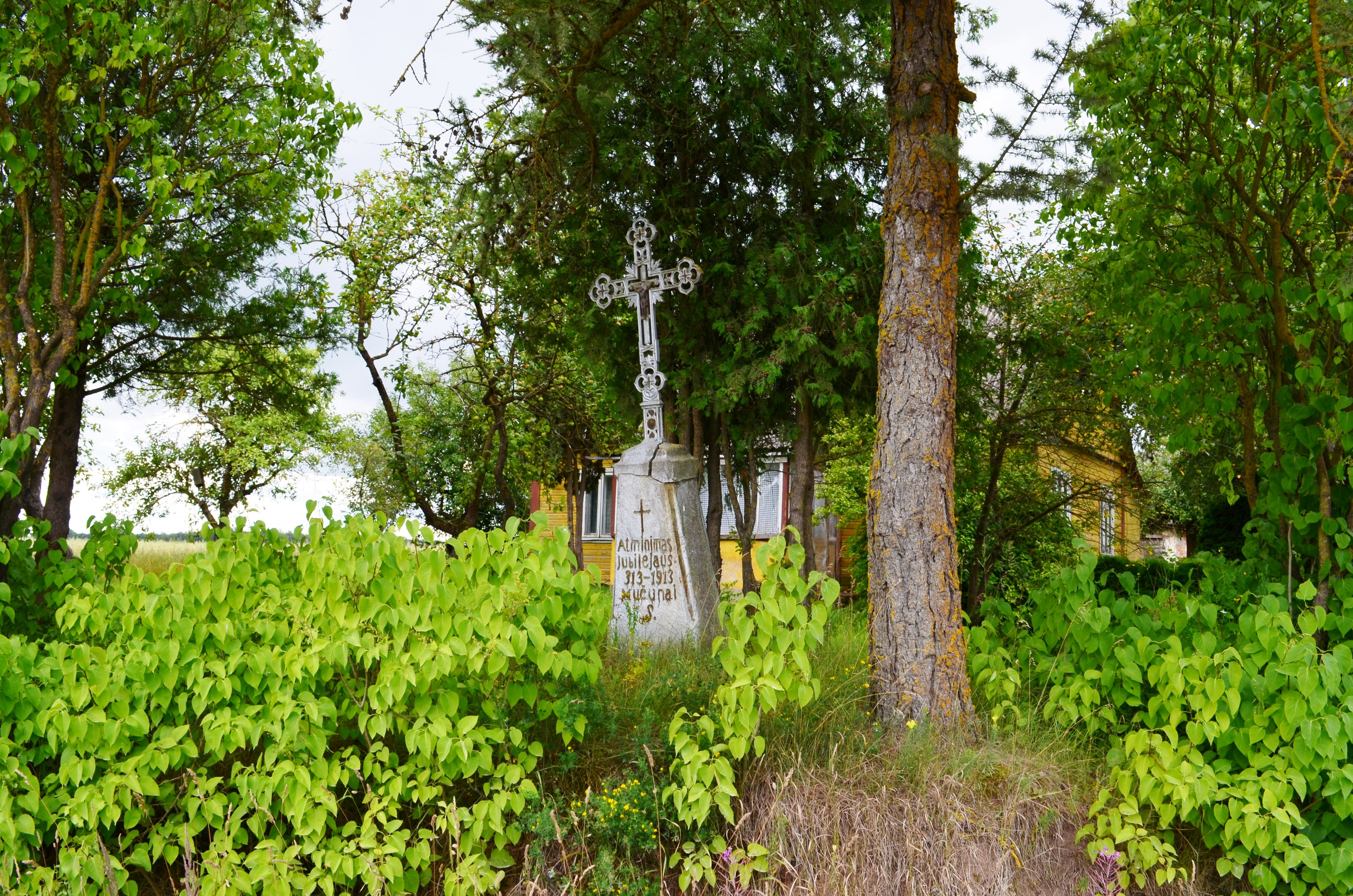 Ąžuolytė, Panevėžio raj.